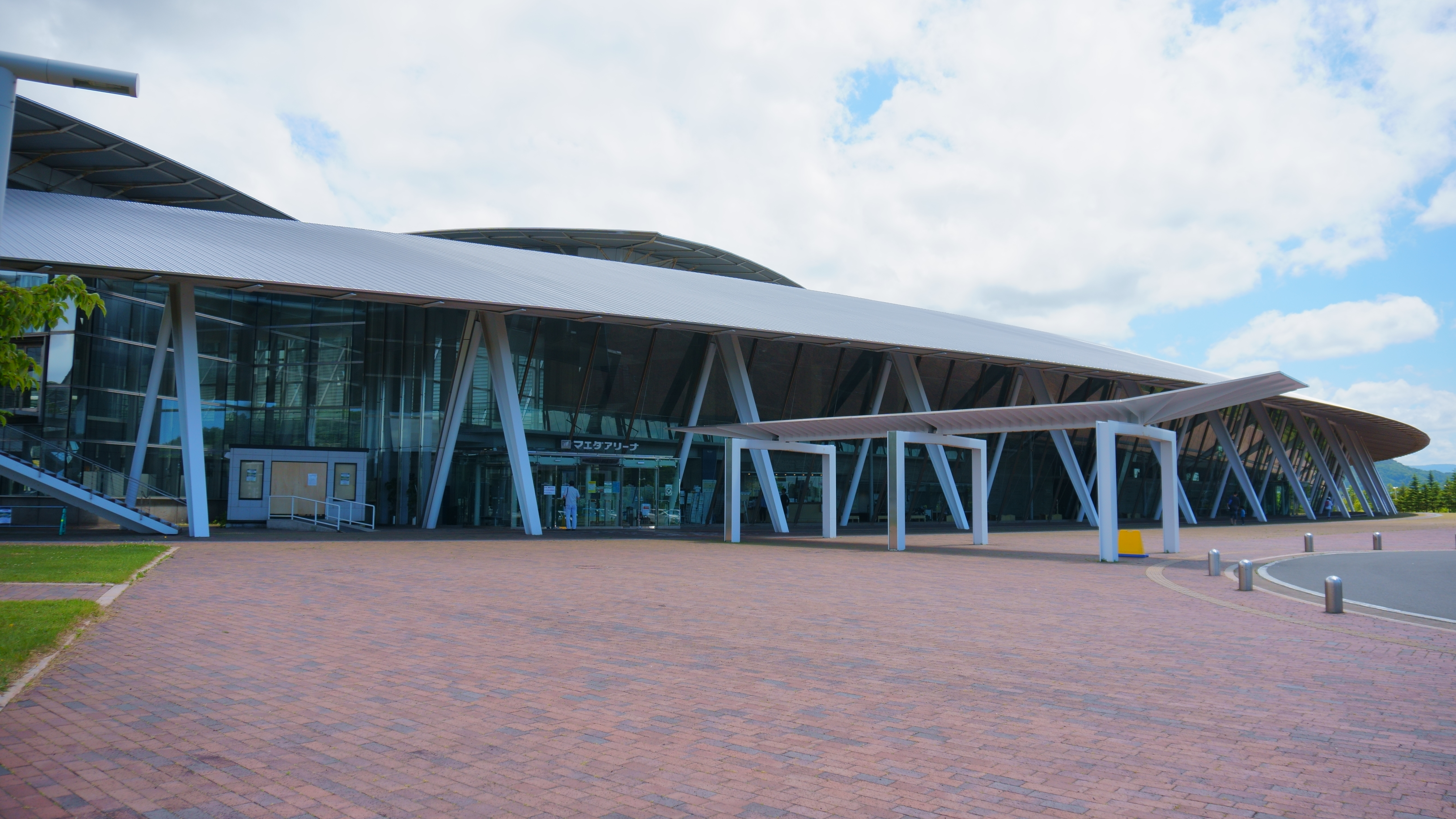 青い森アリーナ（ネーミングライツによりマエダアリーナ）。新青森県総合運動公園 の中核となる施設で、アリーナ、屋内水泳場、宿泊研修棟を兼ね備える。